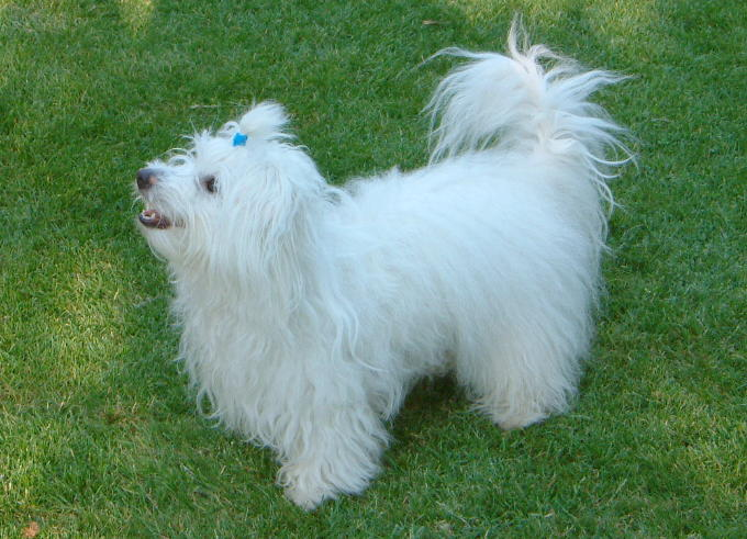 Hündin „Dhana“, Coton de Tular